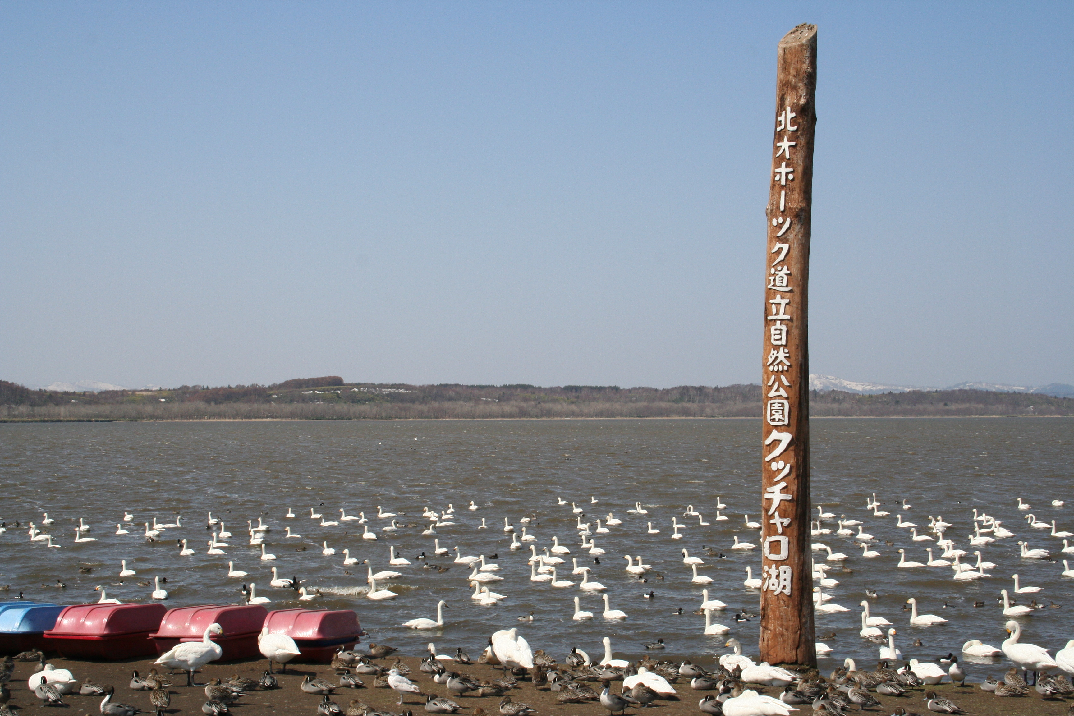 Lake_Kuccharo（クッチャロ湖）,北海道浜頓別町で撮影